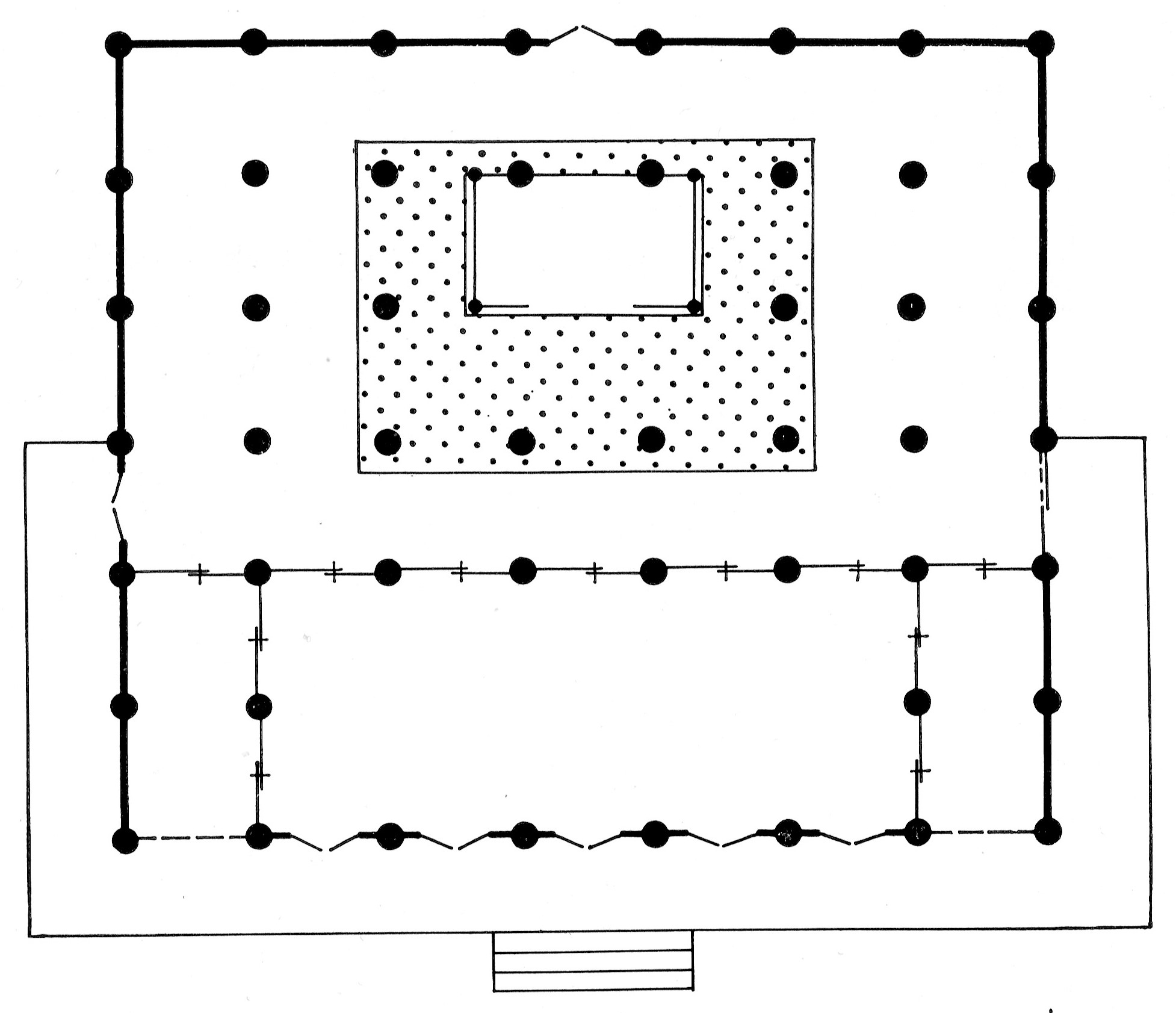 Layout of Enkyô-ji, Kôdô